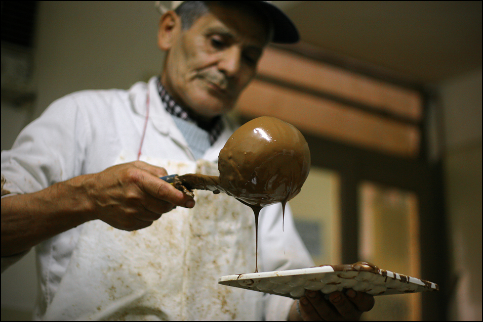 Chocolatería Arrufat, bajo control obrero. Bs As, Argentina